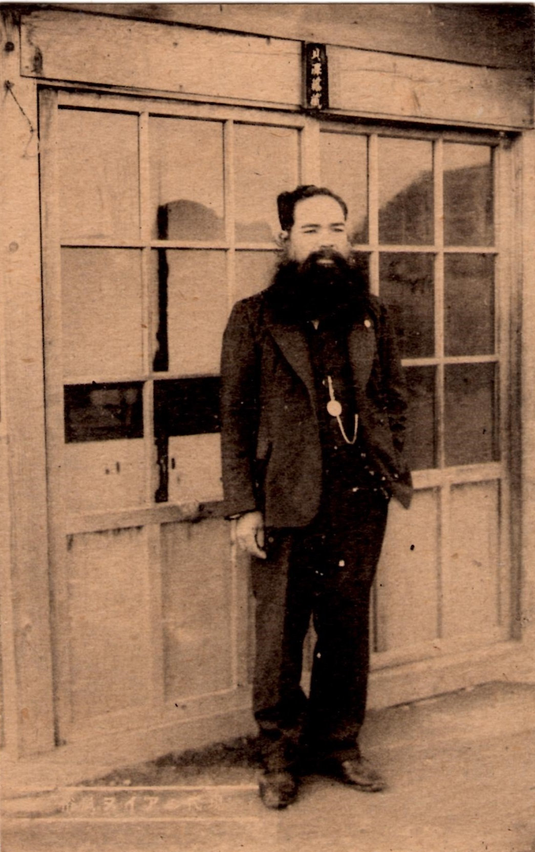 戦前の絵葉書より